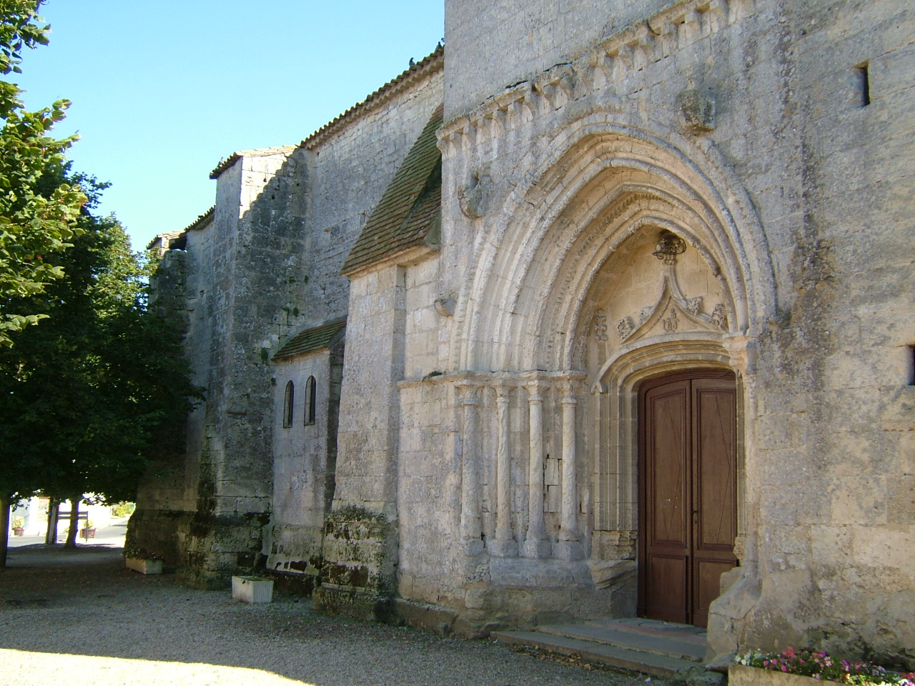 Saint-Laurent-d'Arce, Gironde (France) ; porche et façade nord de l'église.